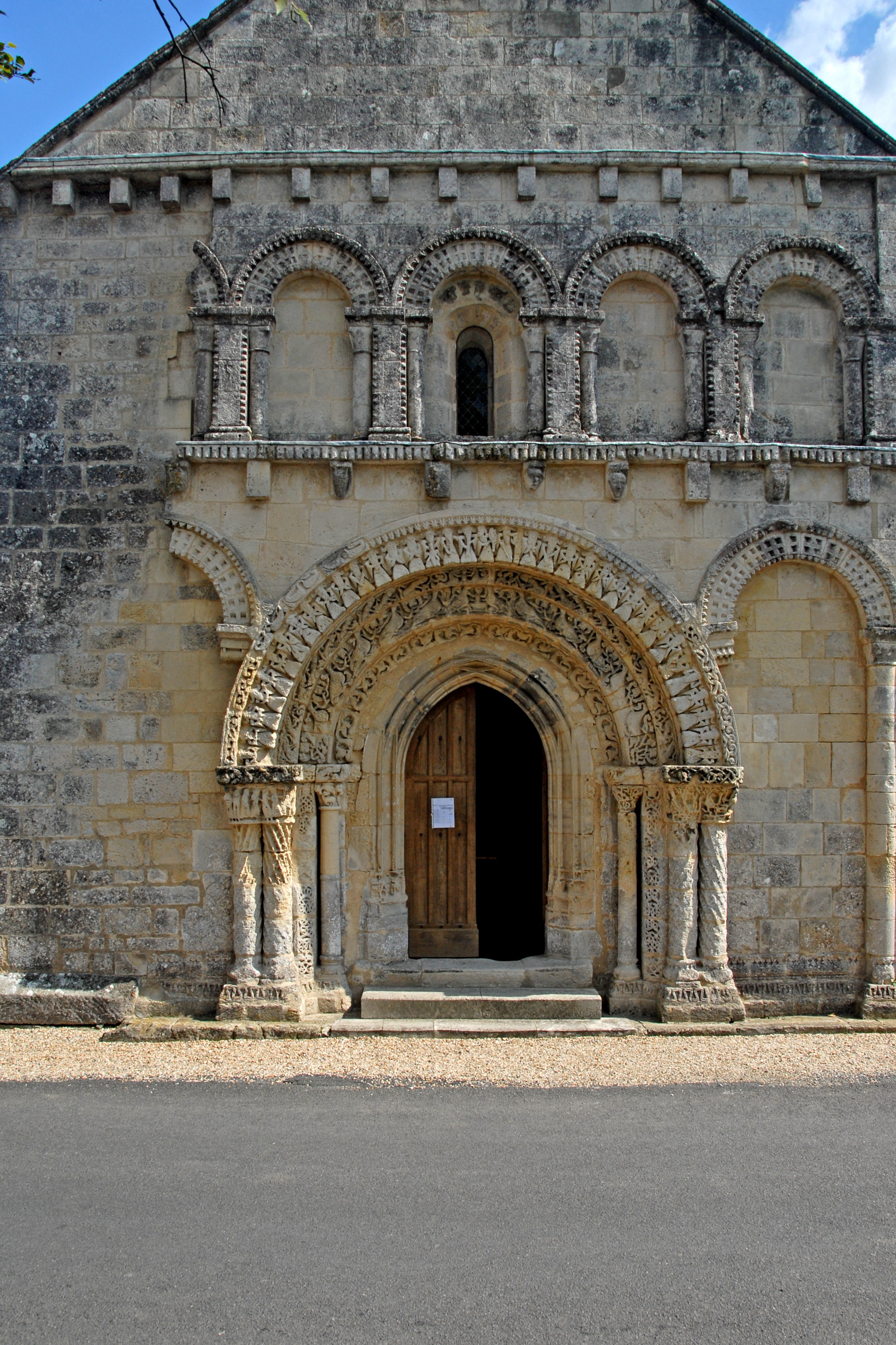 Avy, Fassade